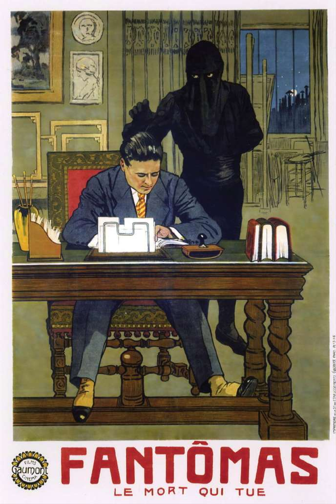 Le Mort qui tue (1913), affiche du troisième film adapté de la saga Fantômas par Louis Feuillade d'après le roman éponyme de Pierre Souvestre & Marcel Allain.